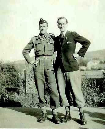 Aloyse Schiltz